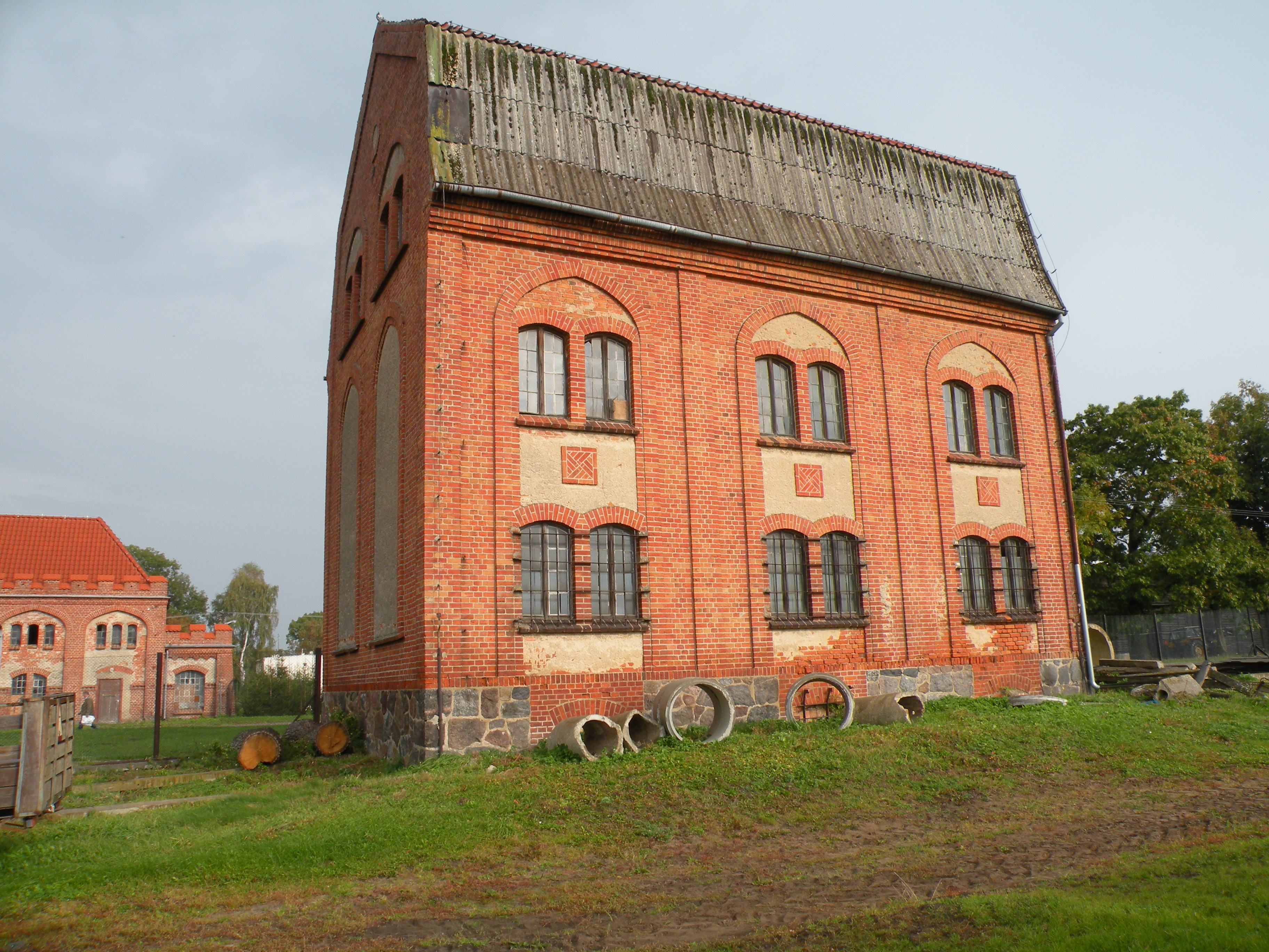 Łężany - zespół zabudowy folwarcznej XIX/XX w.: dawny młyn (zabytek nr A-4304 i A-2681 z 29.06.2004)